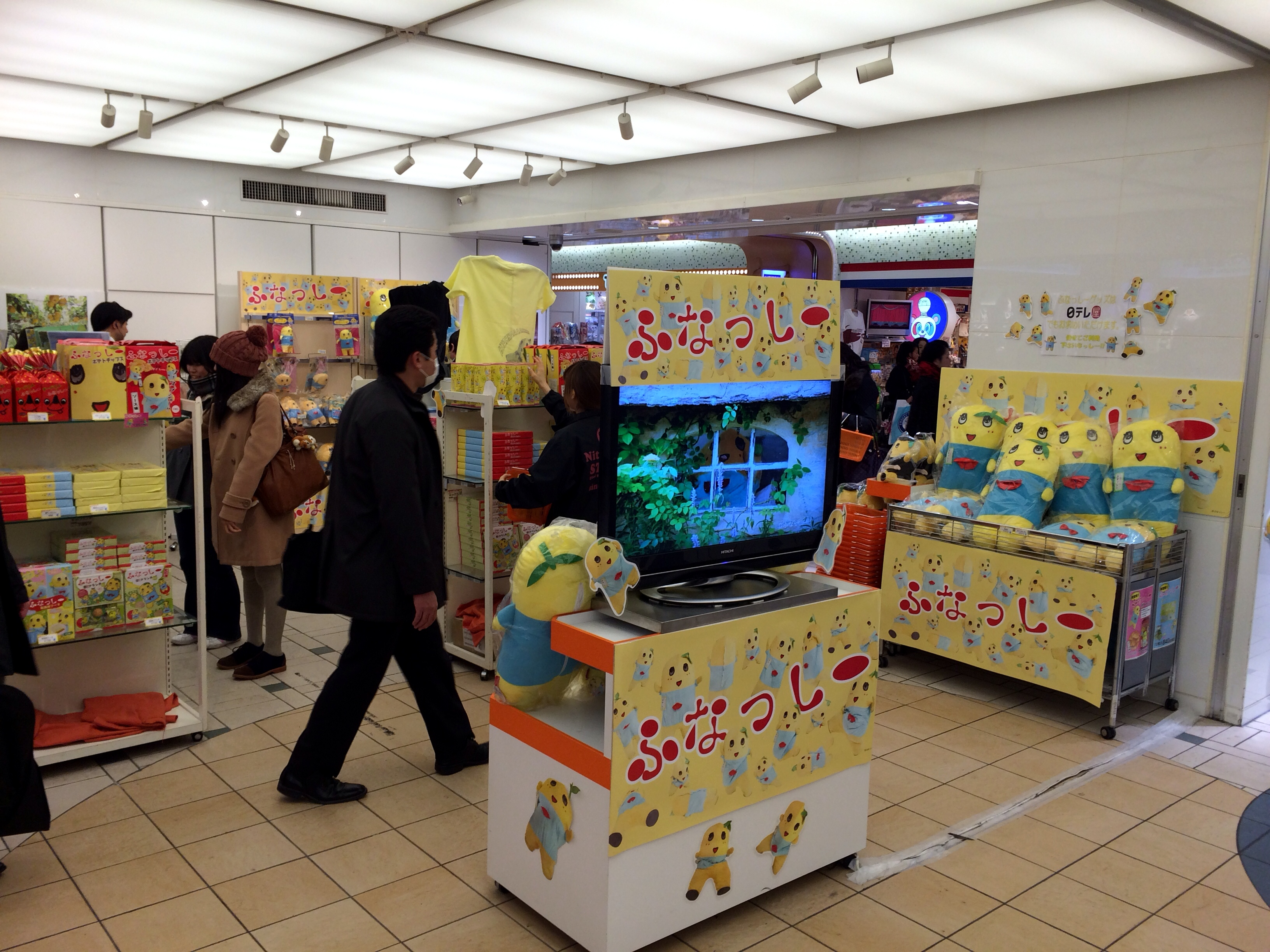 Funasshi store....